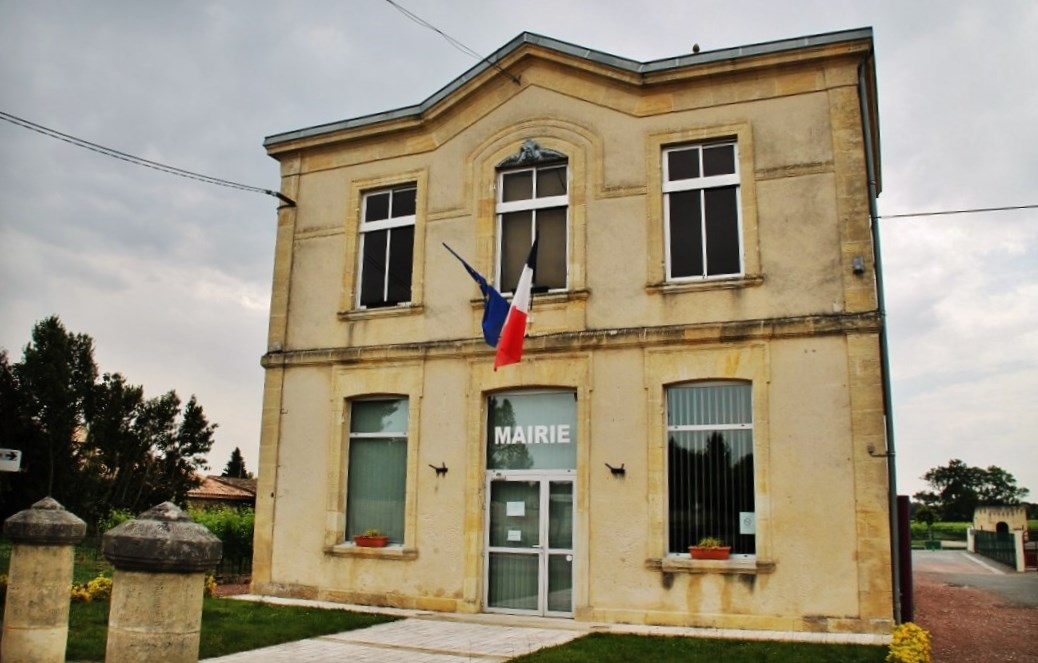 La Mairie